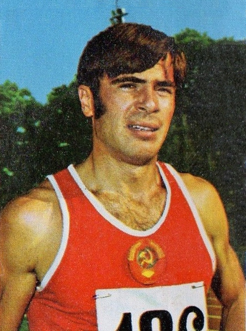 CAMPIONI dello SPORT 1973/74-Figurina n.14- SANEYEV -ATLETICA LEGGERA-Rec